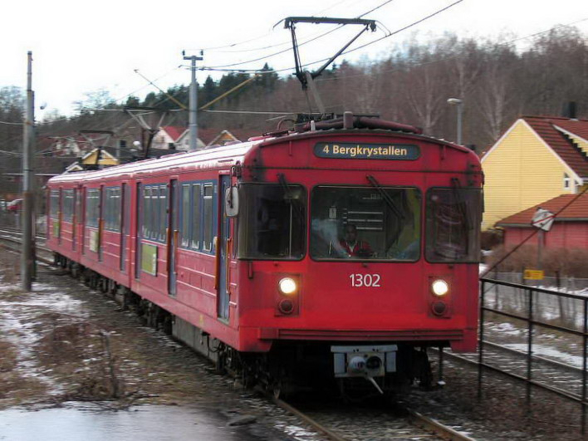 Oslo Sporveier. Kolsåsbanen. T-banevogn 1302, serie T5, i tog på linje 4 til Bergkrystallen.